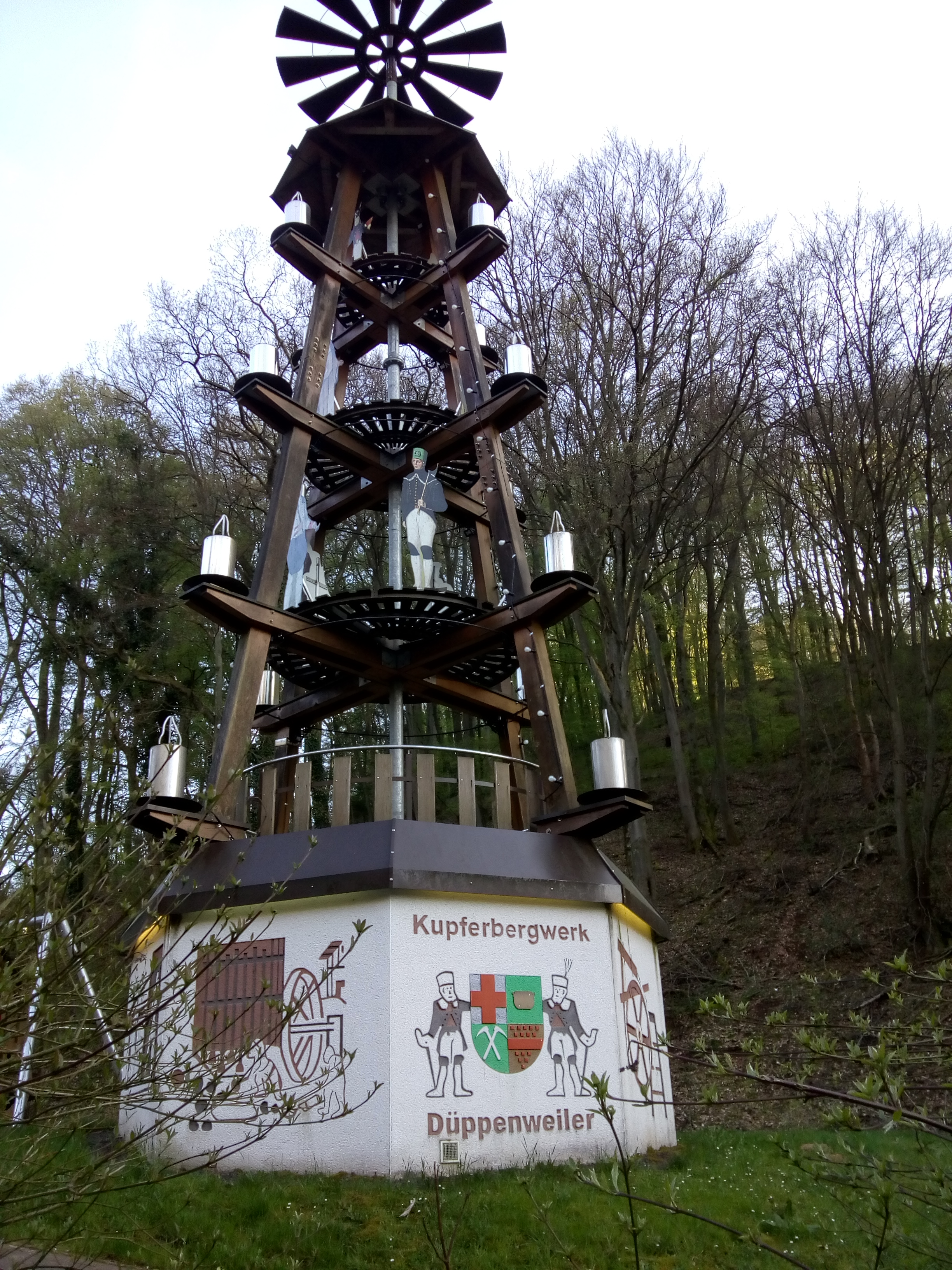 Die Bergwerkspyramide ist fast 13 m hoch.